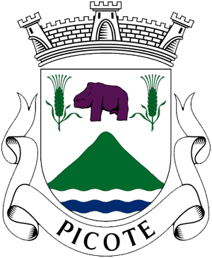 Descrição do Brasão de Picote : escudo de prata, monte de verde, sainte de campanha diminuta ondada de três burelas ondadas de prata e azul; em chefe, um «berrão» de púrpura entre duas espigas de centeio de verde. Coroa mural de prata de três torres. Listel branco, com a legenda a negro: «PICOTE».